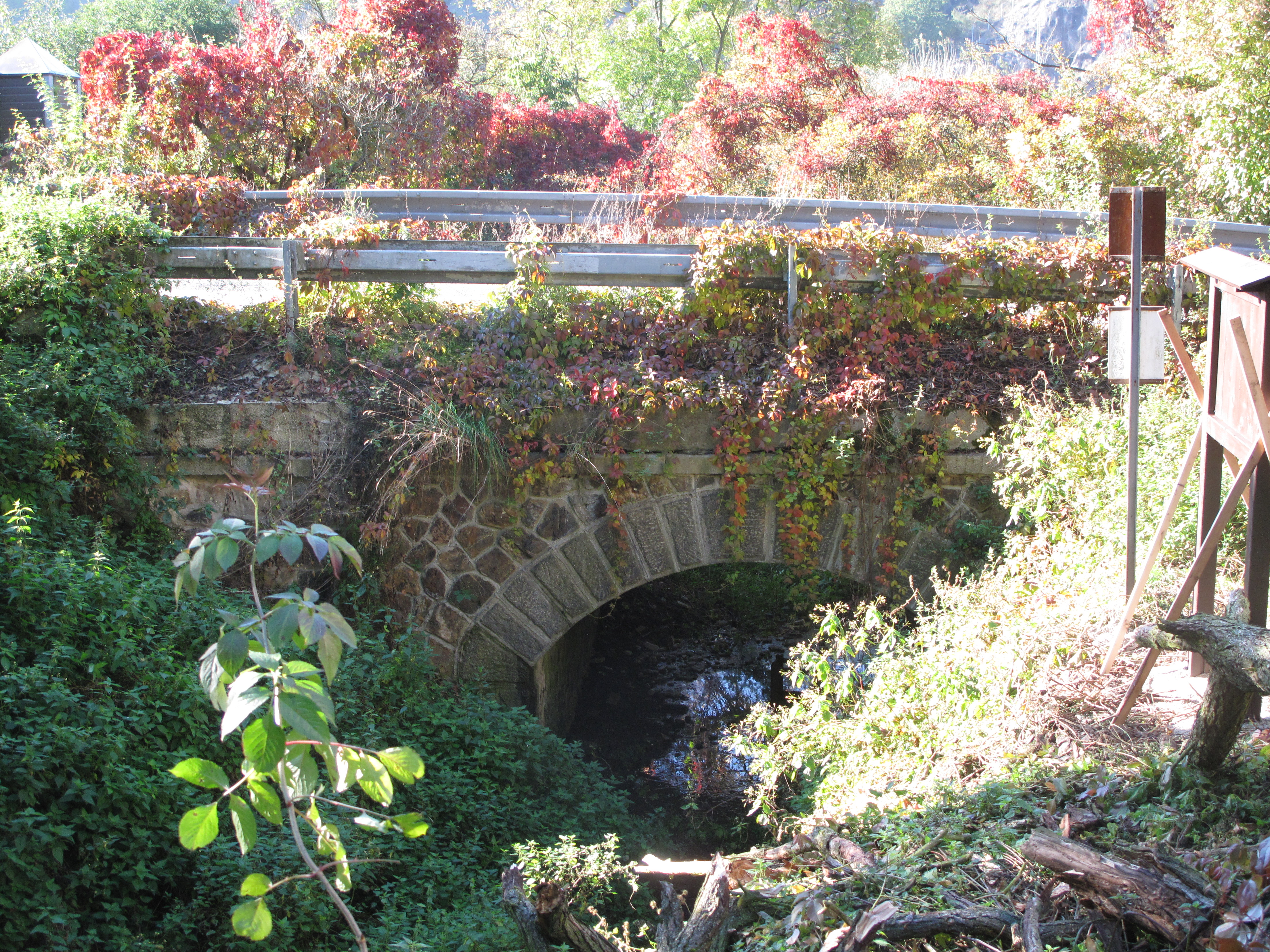 Bohnický potok podtéká Bohnickou ulici